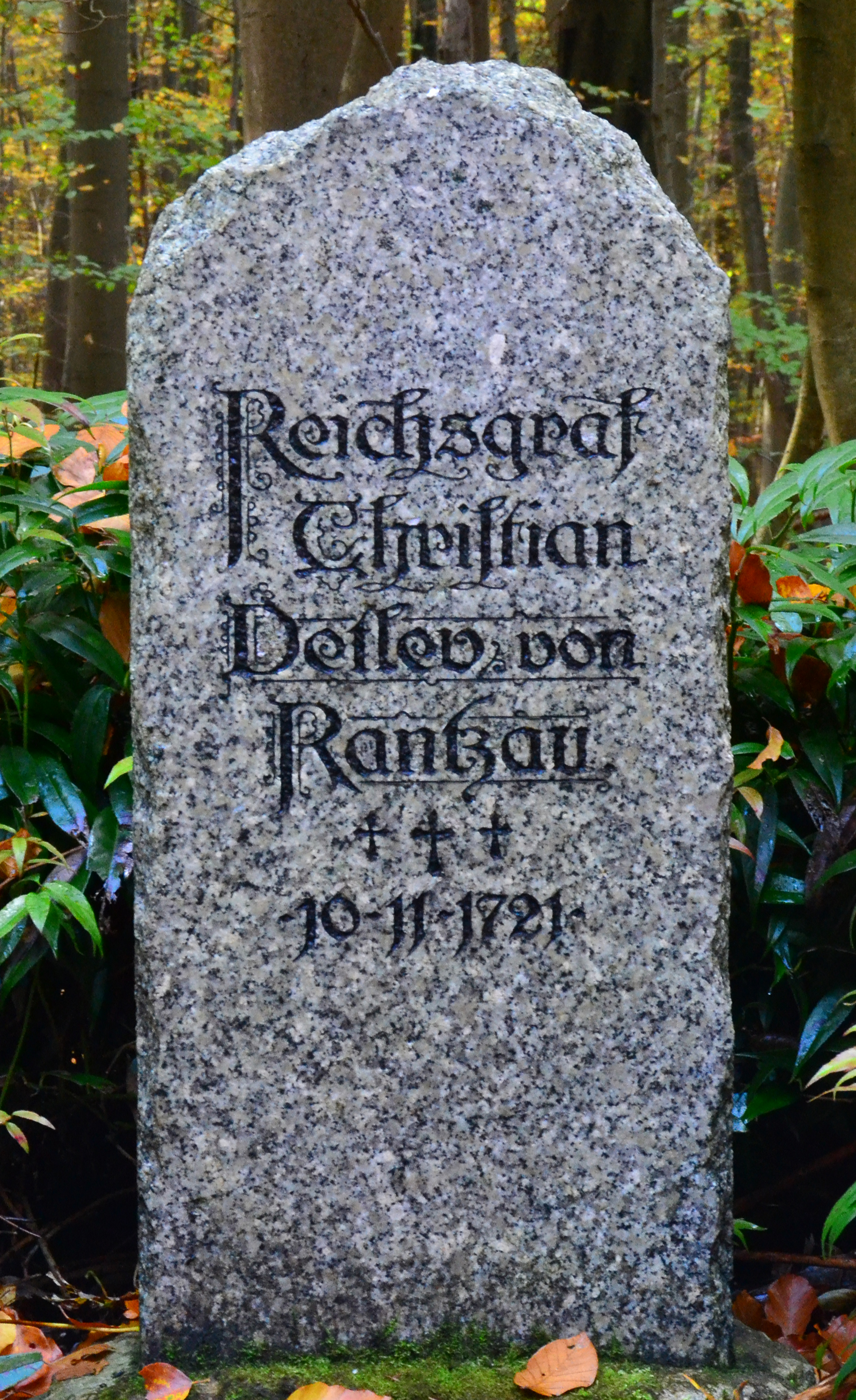 Gedenkstein an den Reichsgrafen Christian Detlef zu Rantzau (1670 - 1721) im Voßlocher Wald